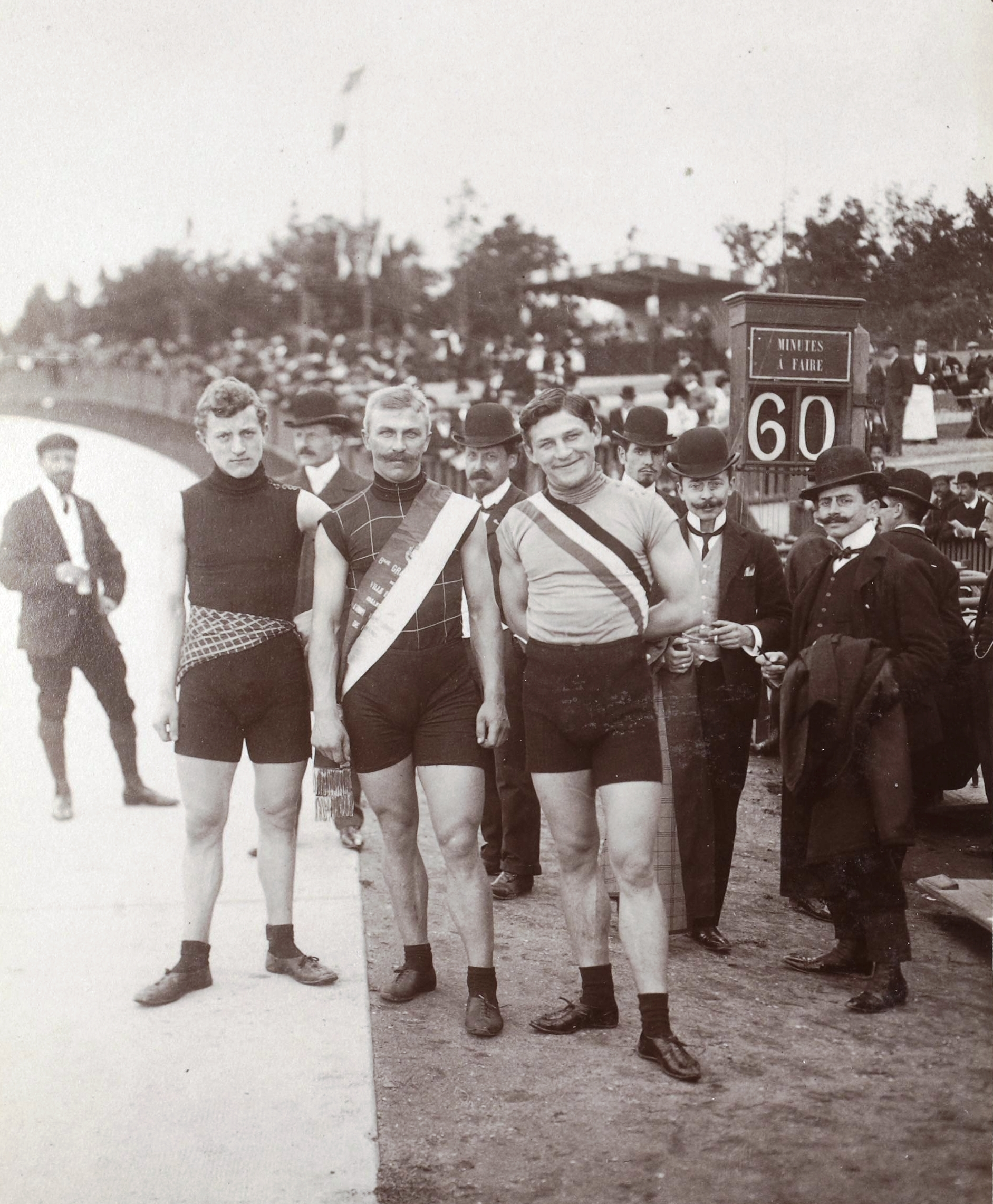 [Collection Jules Beau. Photographie sportive] : T. 14. Année 1901 / Jules Beau : F. 39v. [Grand Prix cycliste de Paris, 15, 19, 22 septembre 1901] ; Rutt, Elleegaard, Arend